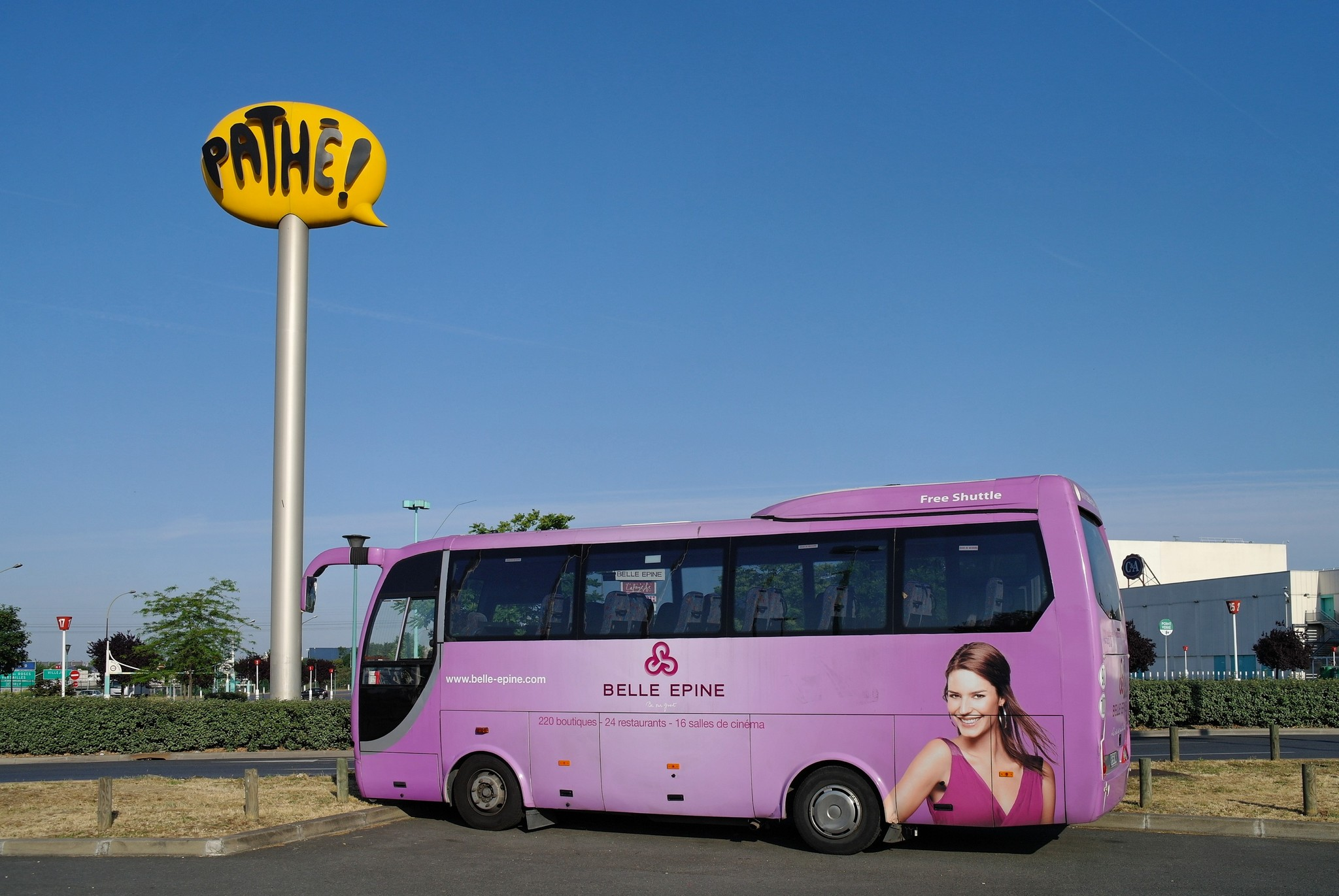 Des éléments du centre commercial Belle Epine à thiais (94)